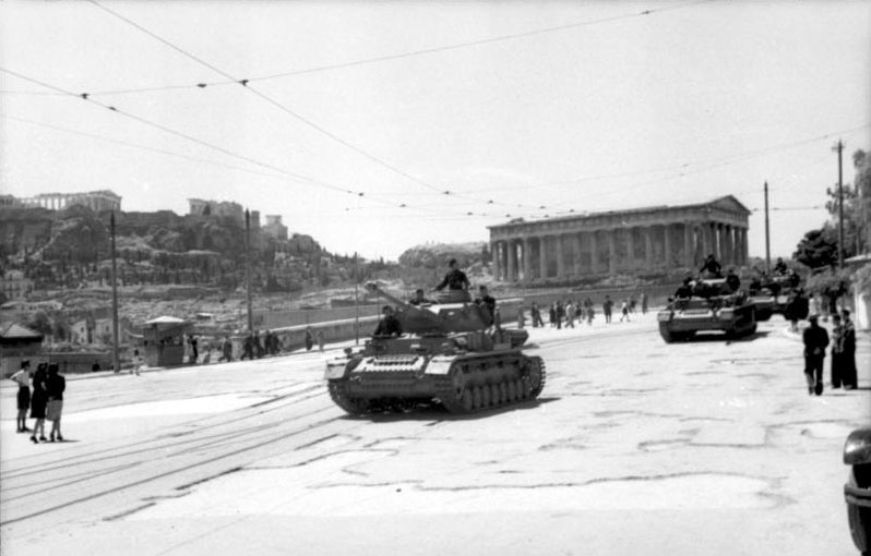 7.6.1943 Panzer rollen durch Athen